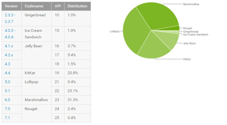 احصائيات نسخ نظام أندرويد 2017